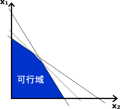 兩個變量的線性規劃問題的可行域。原文件來自英文維基的zh::en:User:Jacj，User:Netsonfong修改: Image:Linear programming example graph.png。